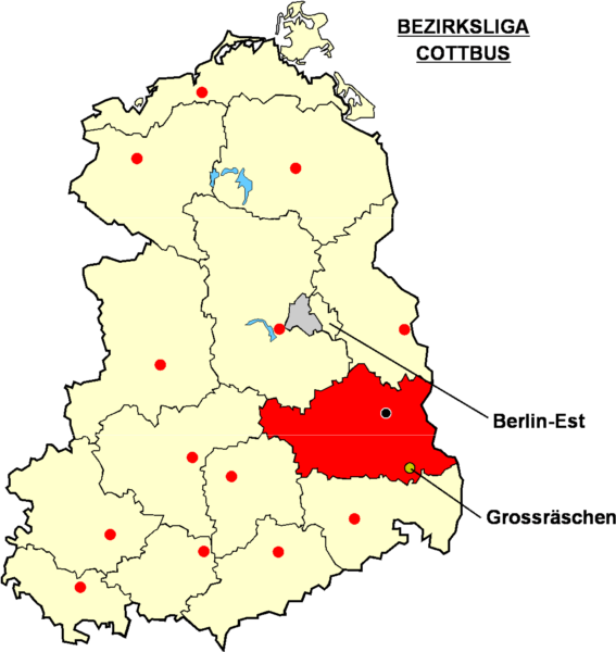 Localisation de Grossräschen dans la "Bezirksliga Cottbus" à l'époque de la RDA Catégorie:Logo de clubs de football - Allemagne